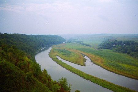 Widok na Zbrucz z Okopów Swietej Trójcy